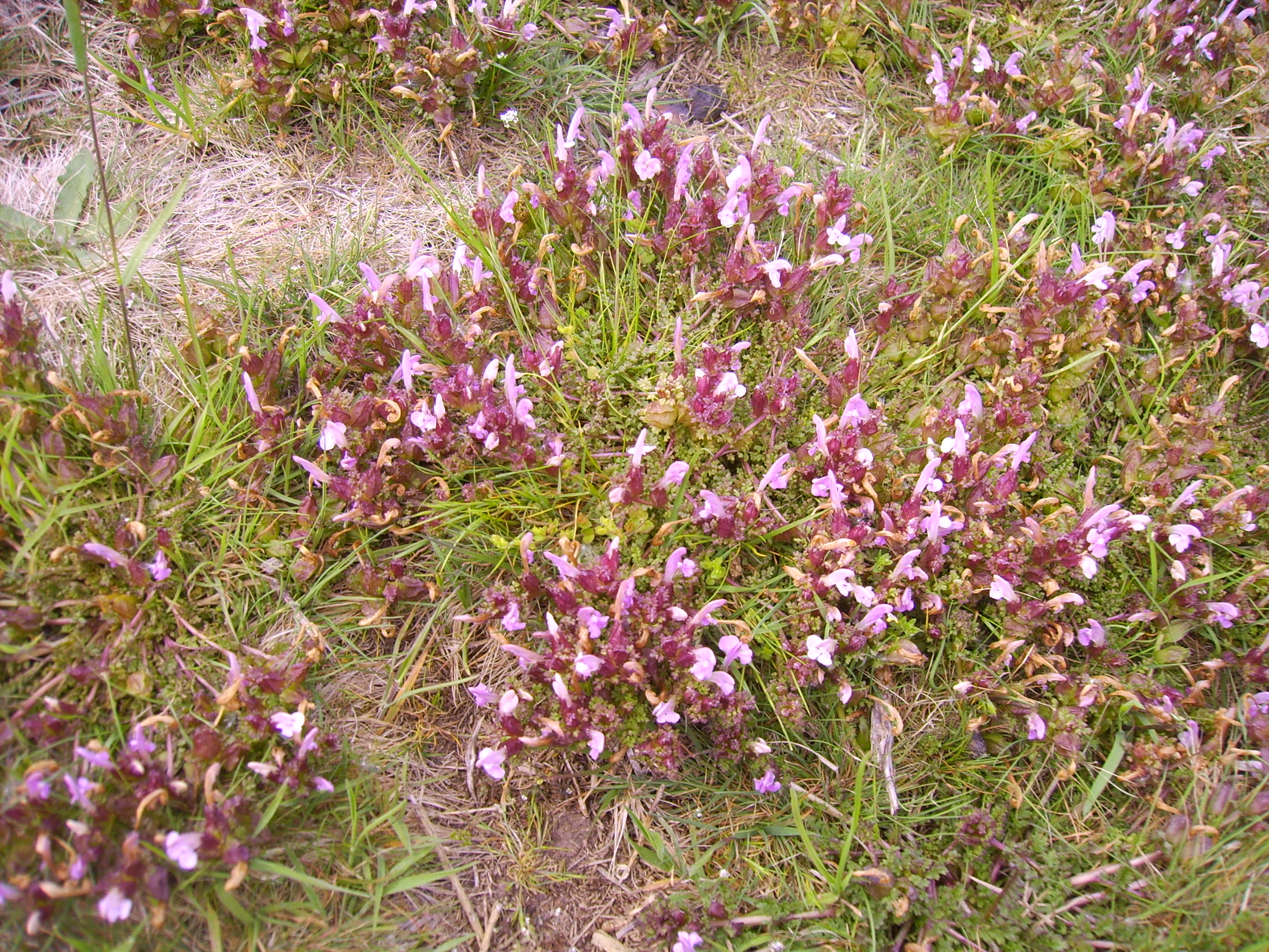 Pedicularis sylvatica